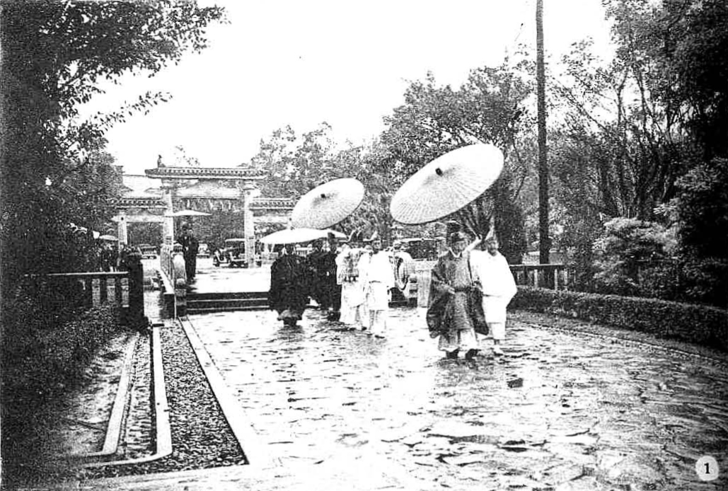 中文（台灣）: 建功神社為台灣日治時期設立於台北市南門町的神社，圖為1934年建功神社祭時的幣帛供進使參進之景象。